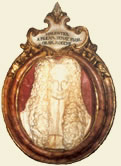 Vincenzo da Filicaja. Autore Ildebrando --Ildebrando 18:43, 14 giu 2006 (CEST)